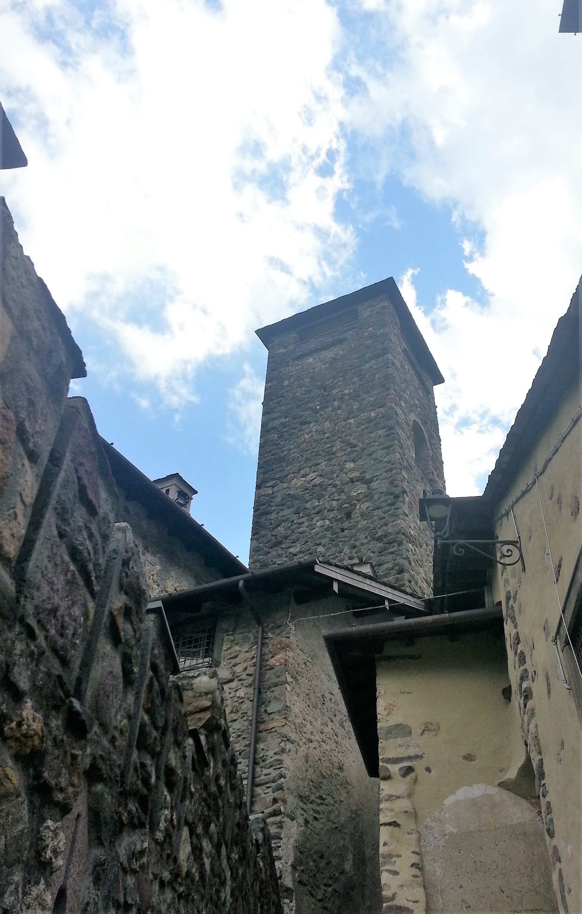 mura esterne del castello Ginami-Buccelleni con torre di Gromo